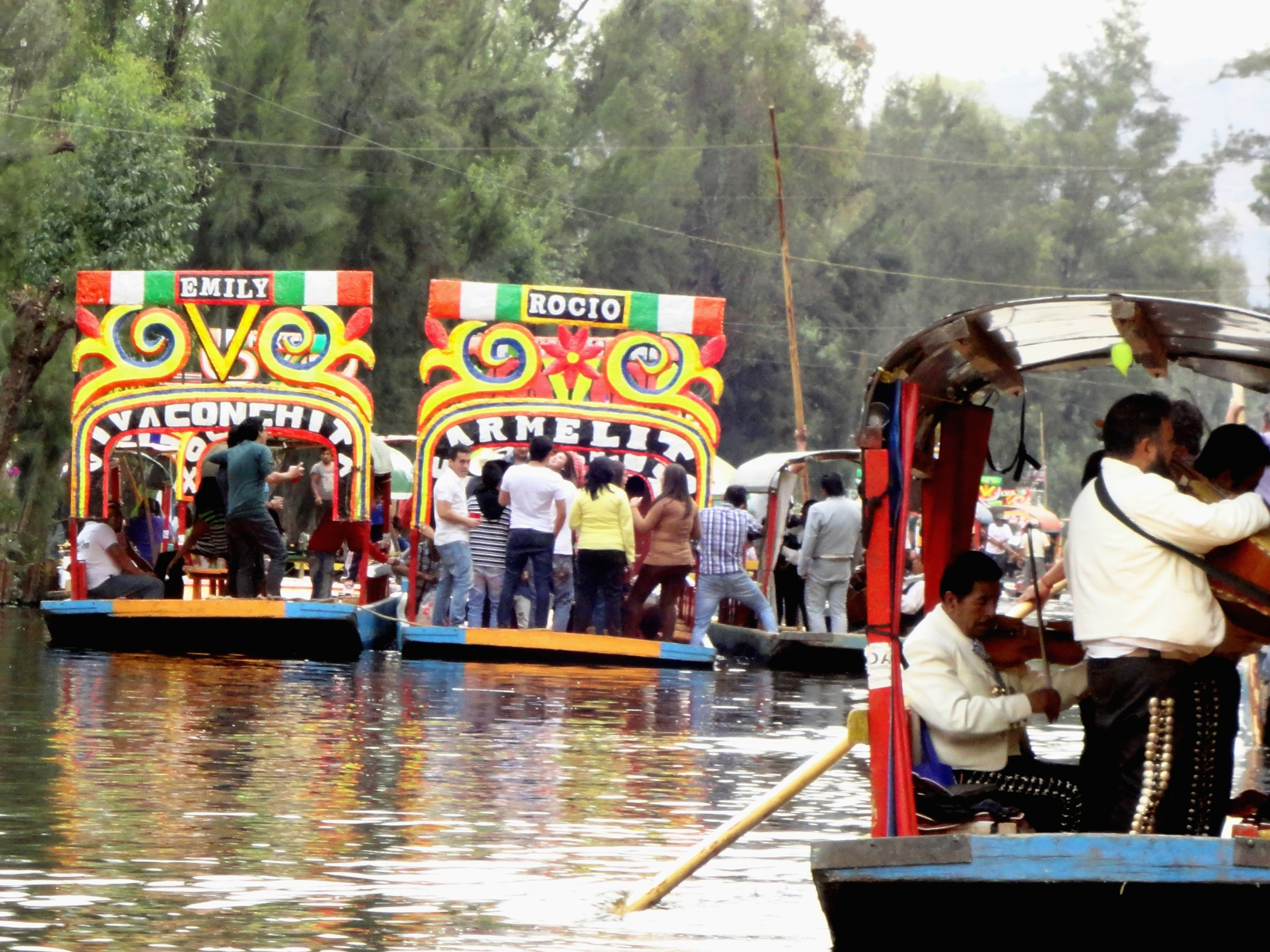 Mariachis en Xochimilco, CDMX, México.